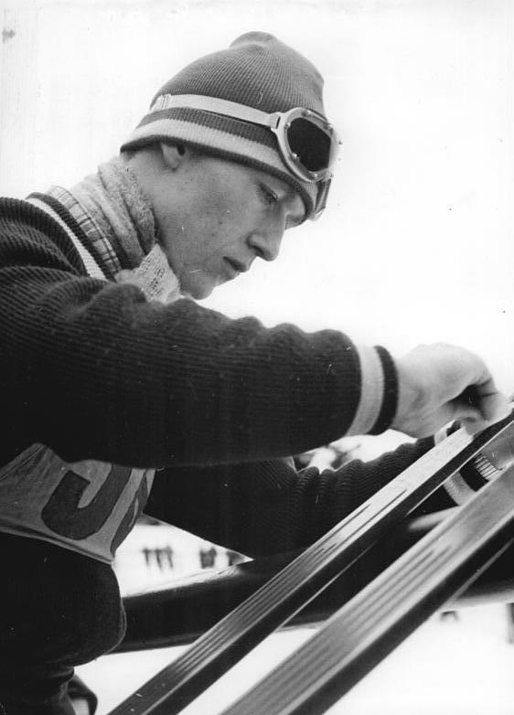 Zentralbild Wendorf 15.1.1962 Peter Lesser siegte Das zweite Ausscheidungsspringen für die Welrmeisterschaften in Zakopane gewann am 14.1.1962 auf der Großen Aschbergschanze in Kllingenthal der talentierte Nachwuchsspringer Peter Lesser mit Sprüngen von 96 und 89 Metern. Er verwies den Weltmeister und Olympiasieger Helmut Recknagel auf den zweiten Platz. UBz: Der Sieger Peter Lesser beim Einwachsen der Skibretter.